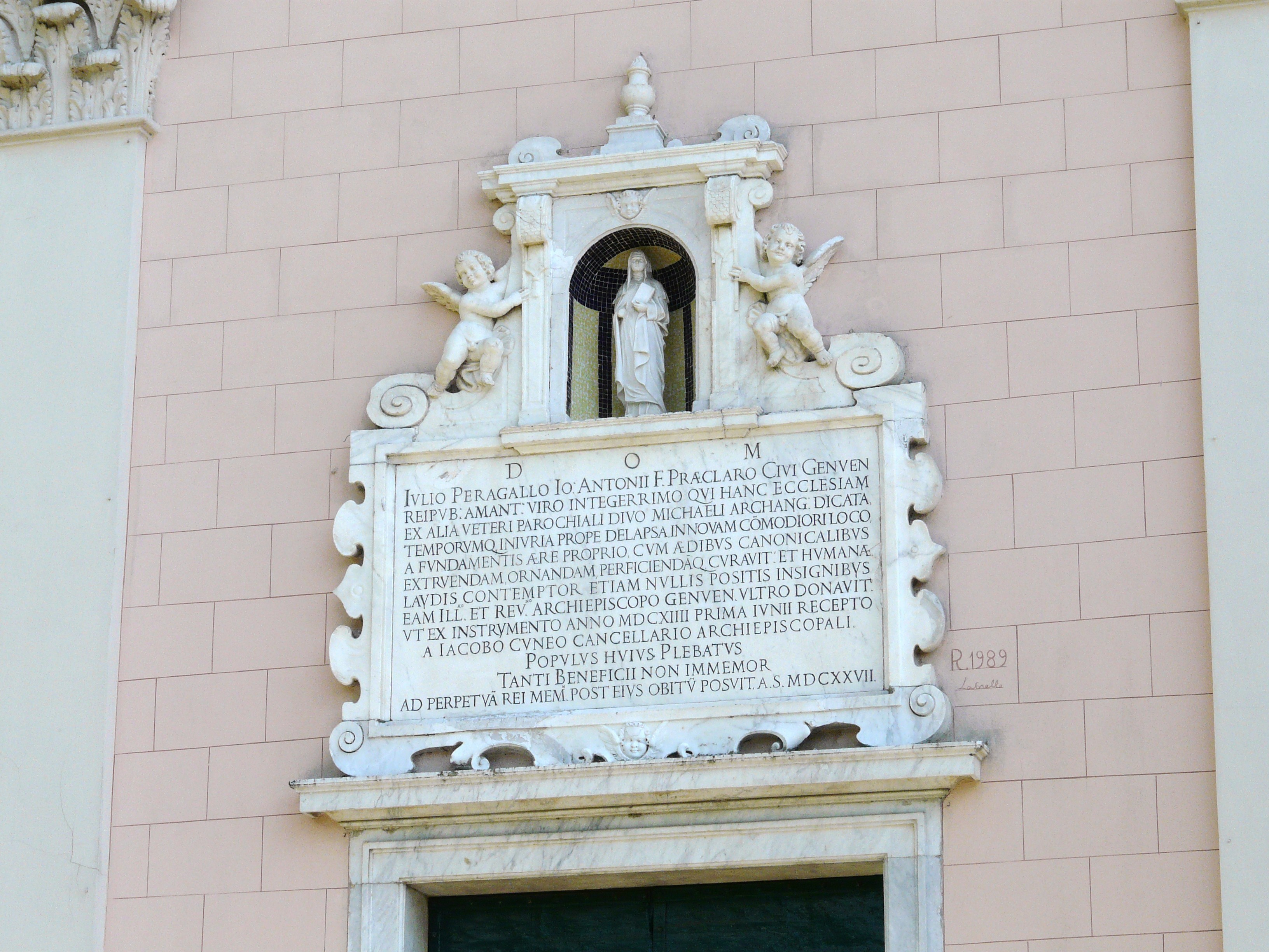 Chiesa di San Michele di Ruta, Camogli, Liguria, Italia